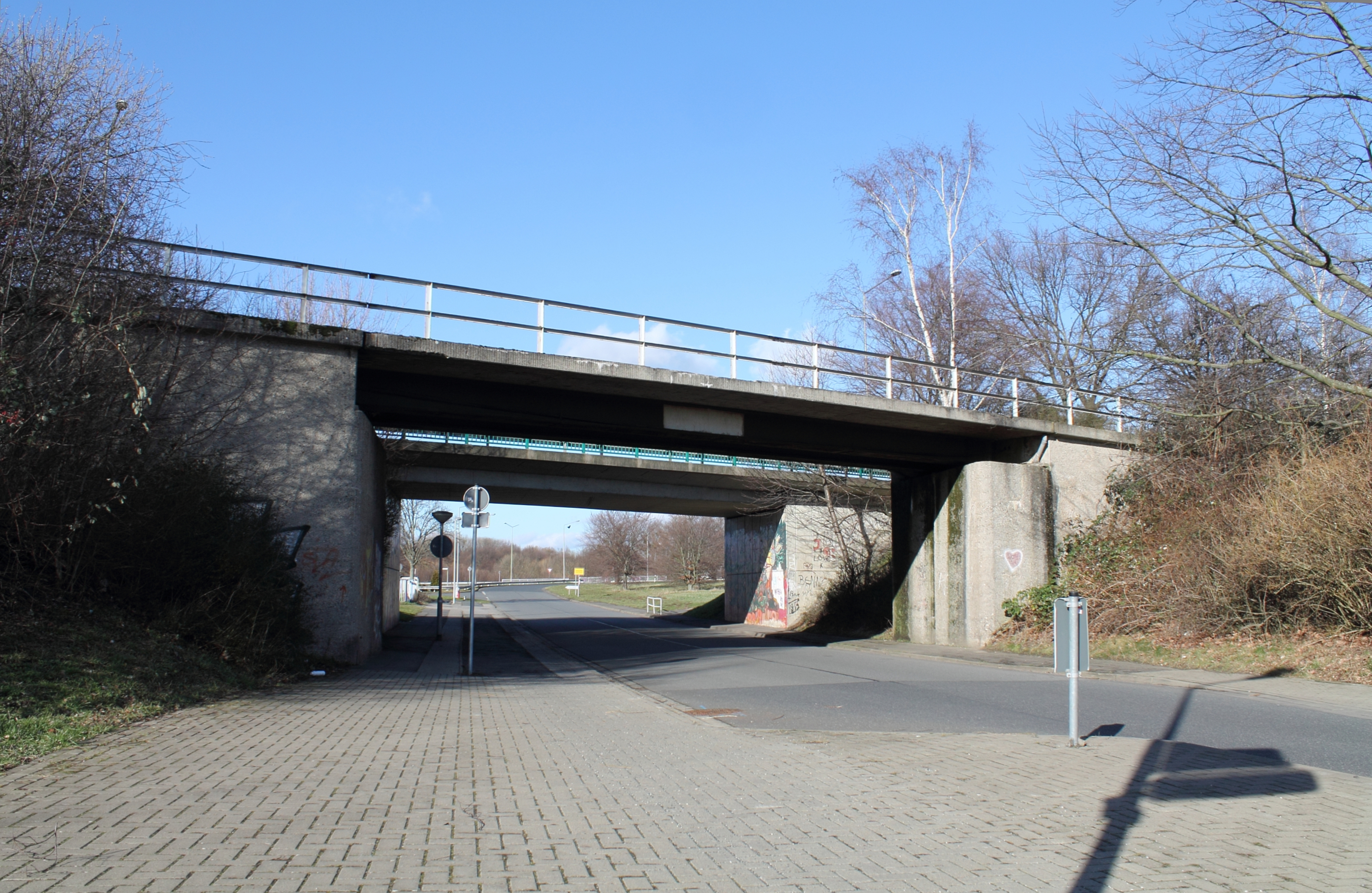 Brücke der Bahnstrecke Braunschweig–Derneburg über eine Straße in Salzgitter zwischen km 30,3 und 32,8.